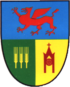 Herb gminy Bielice w latach 1996-2007 (woj. zachodniopomorskie)